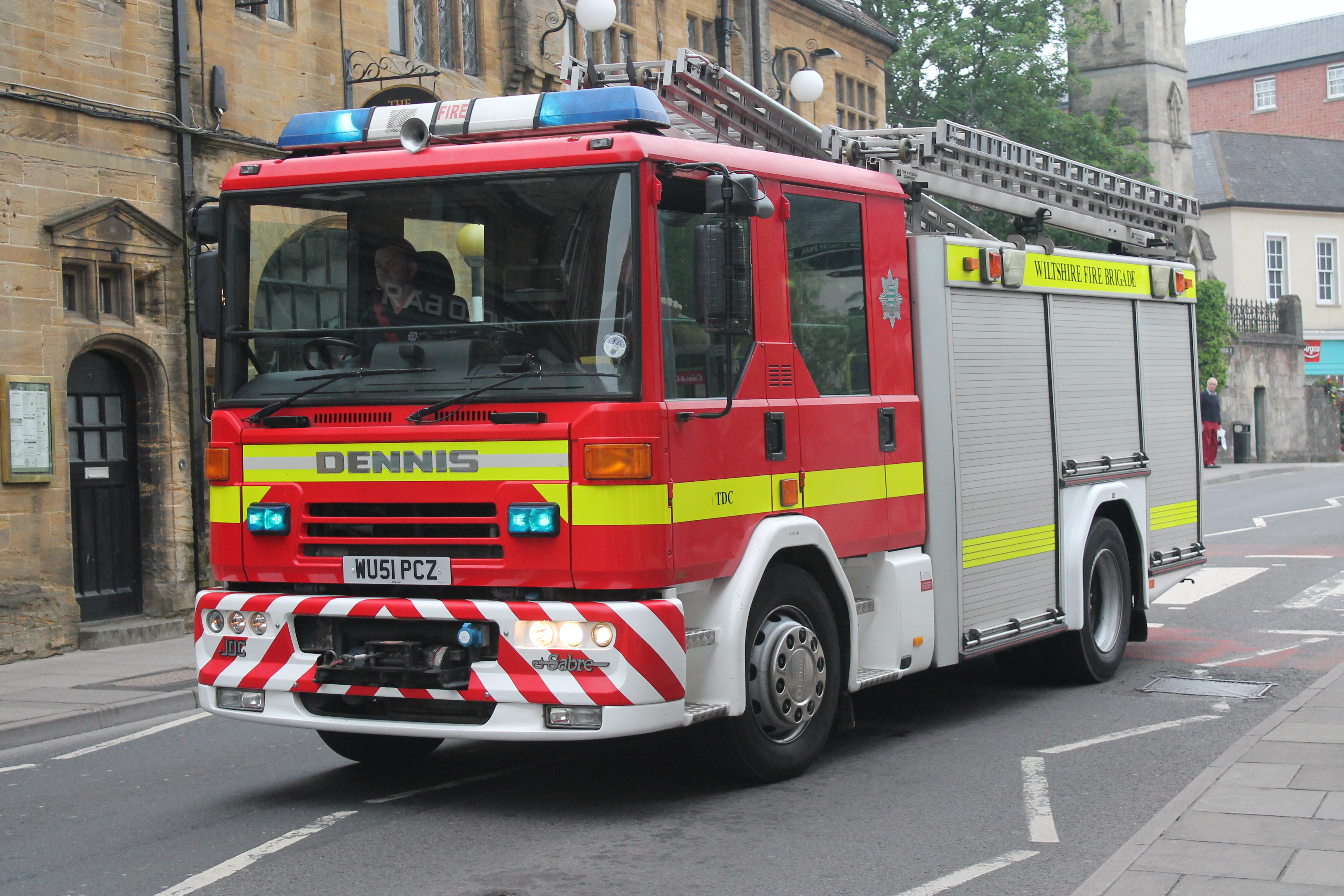 WU51PCZ